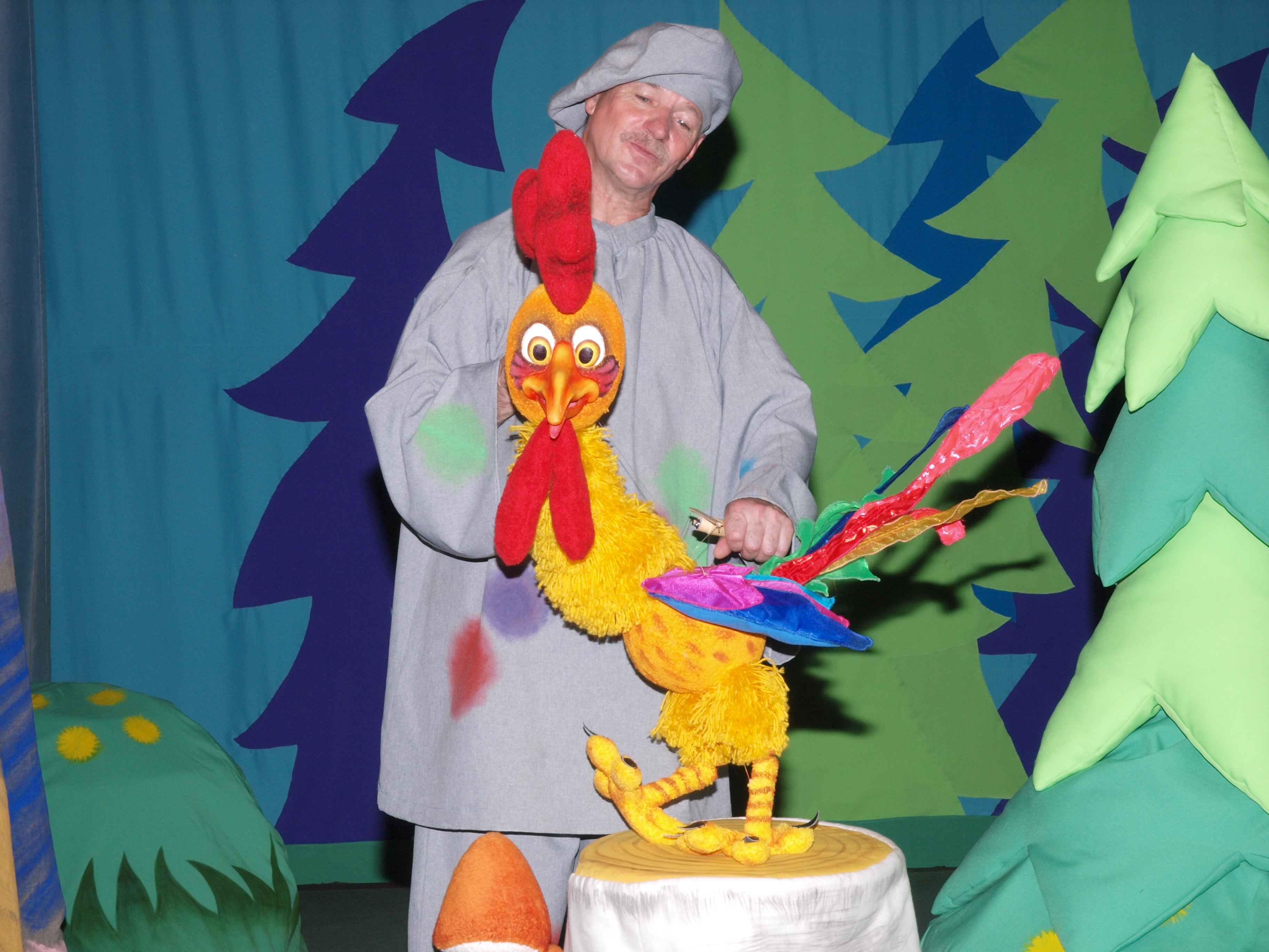 "Веселые краски" Н.Гернет